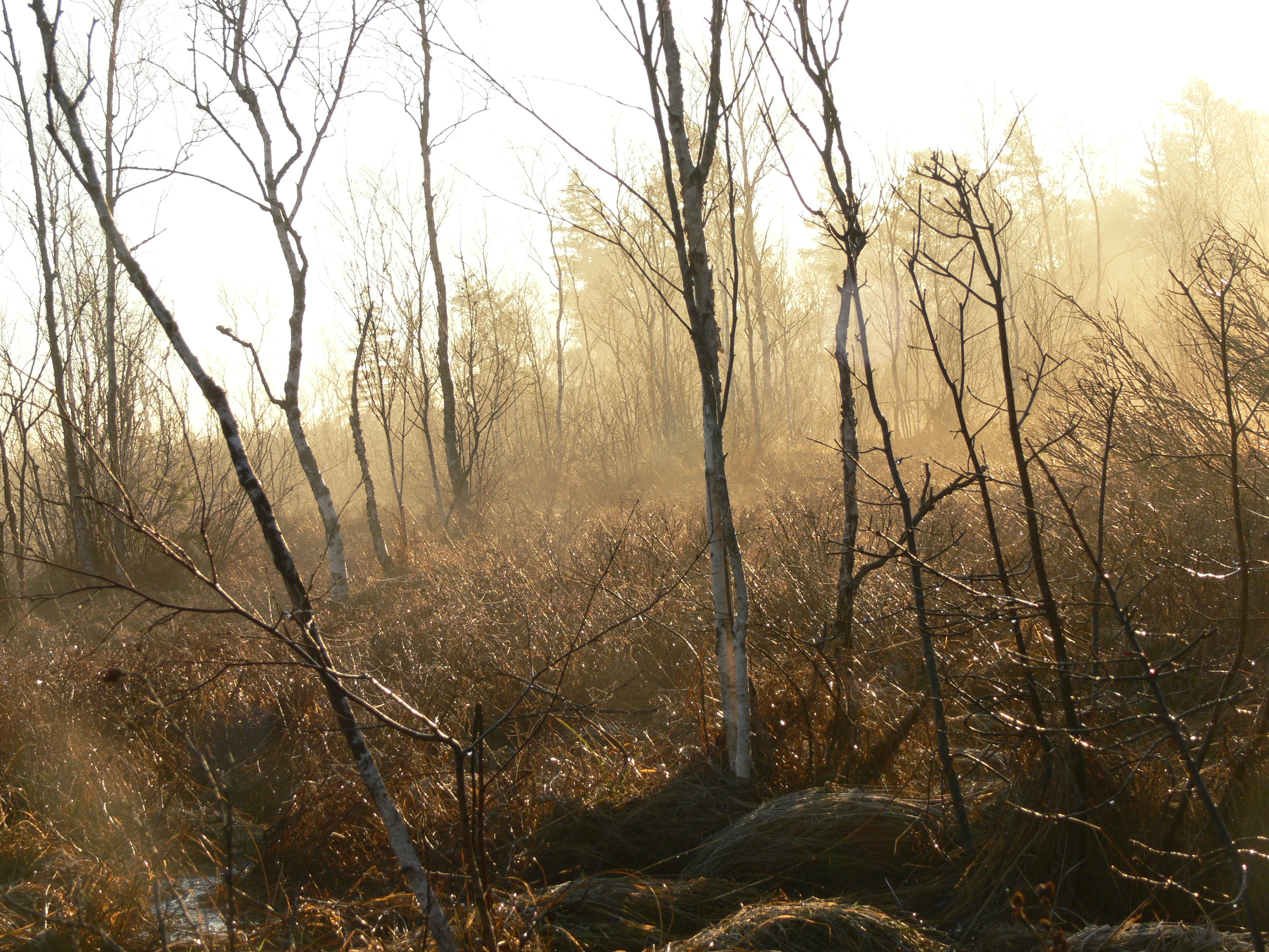 Linnuraba looduskaitseala, Kernu vald, Harjumaa